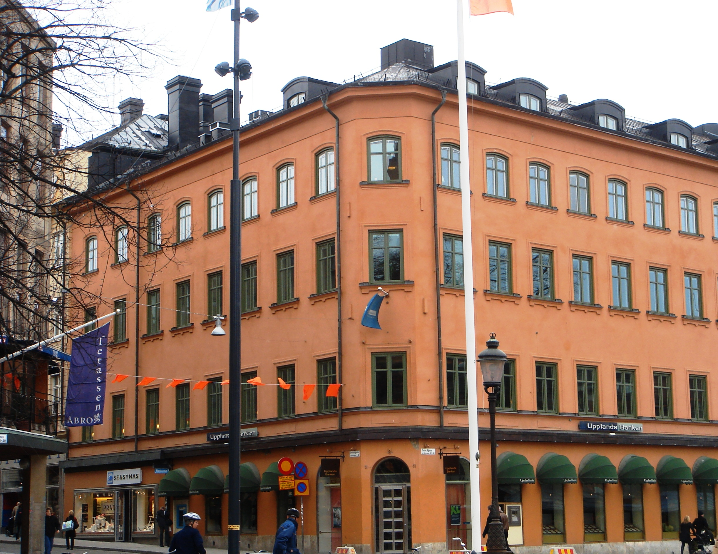 Norrlands nation Uppsala 1869-1889